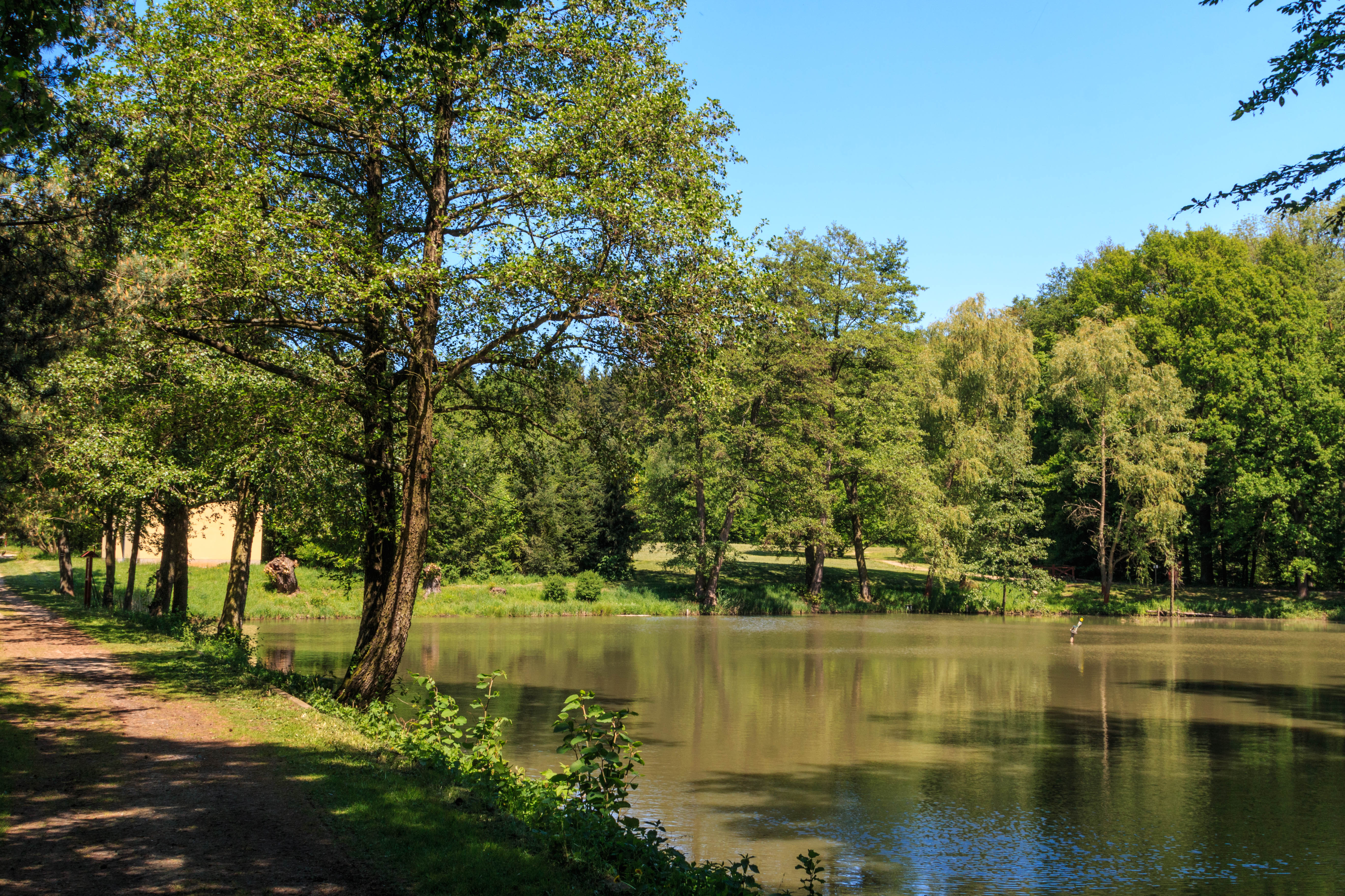 Rybník Brigádník u Libčan Project: Vodstvo.